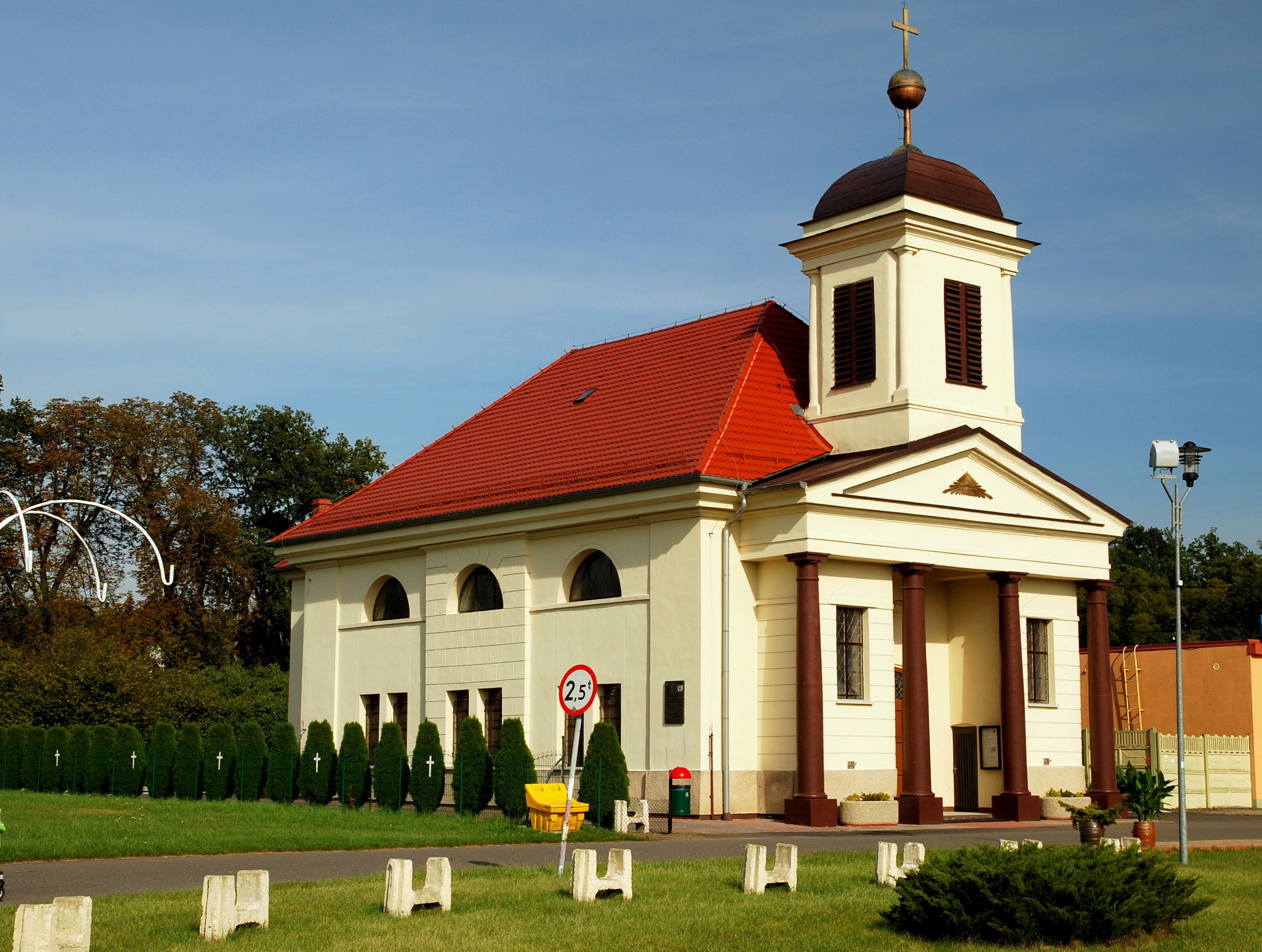 Kotlarnia, kościół poewangelicki gmina Bierawa woj. Opolskie OP